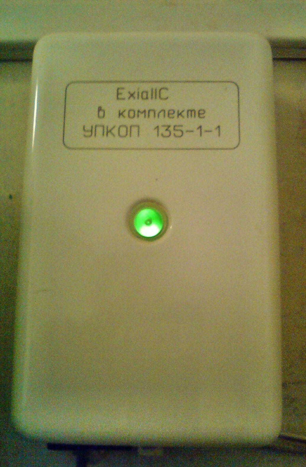 Устройство приемно-контрольное охранно-пожарное взрывозащищенное с видом взрывозащиты Искробезопасная электрическая цепь УПКОП135-1-1. Маркировка взрывозащиты ExiaIIC